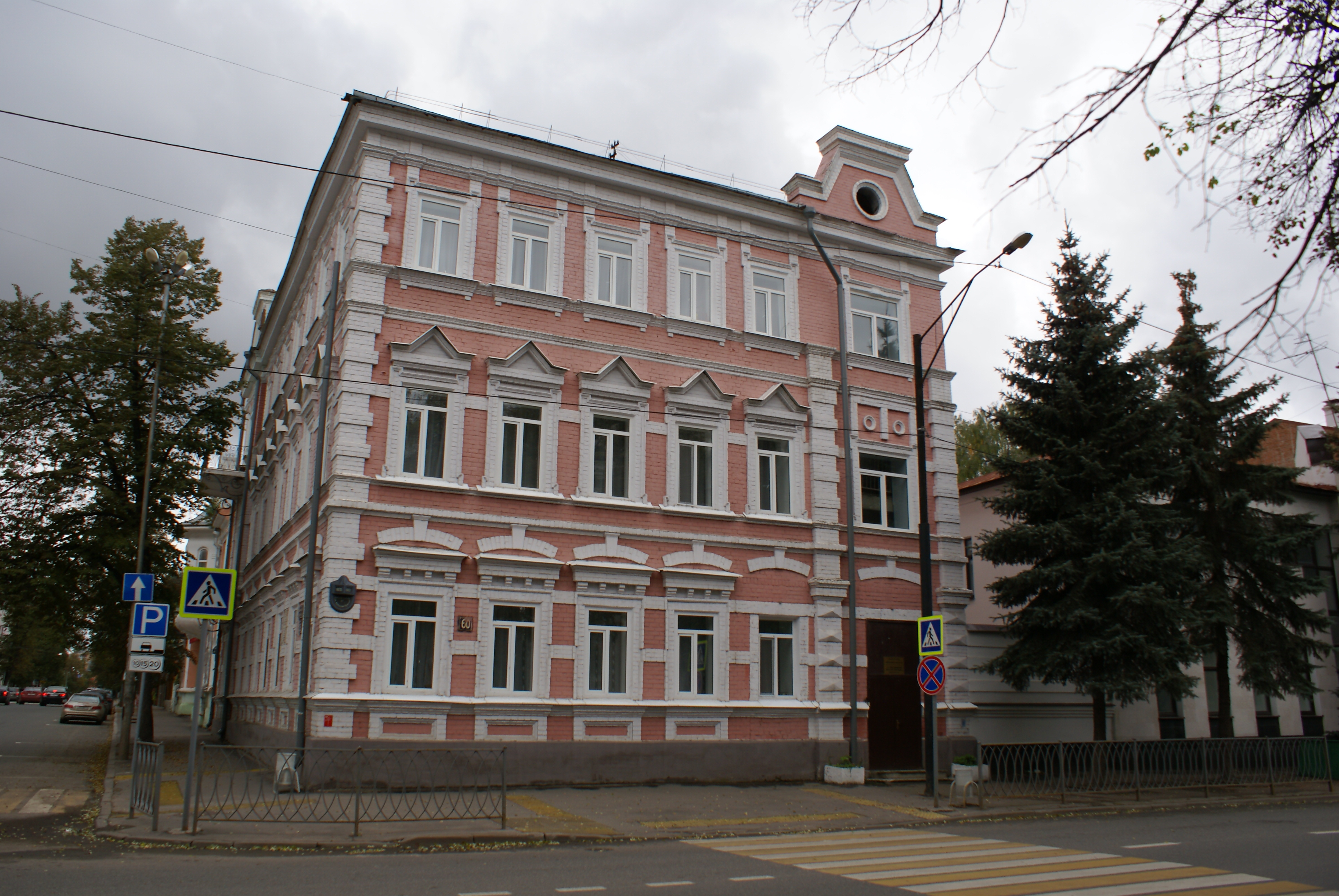 Дом, в котором жил профессор А. Ф. Самойлов: улица Большая Красная, 60 / улица Комлева, 35, Казань, Татарстан